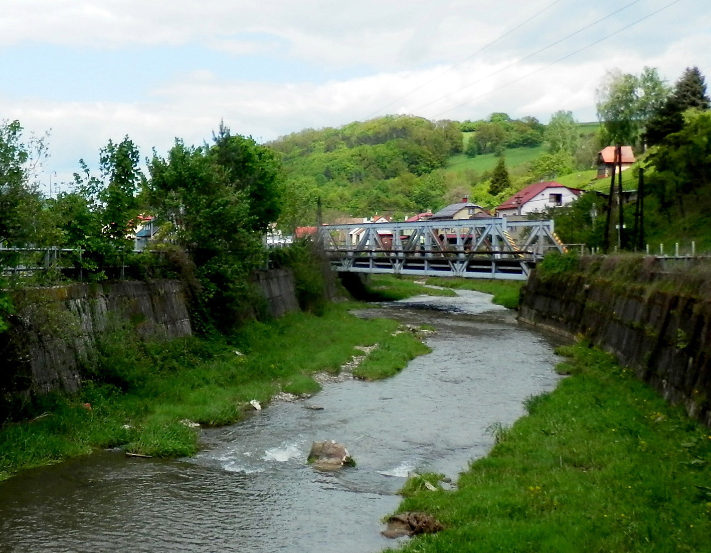 Potok. Ulica Pod Kalváriou. Mesto Bardejov. Slovensko.